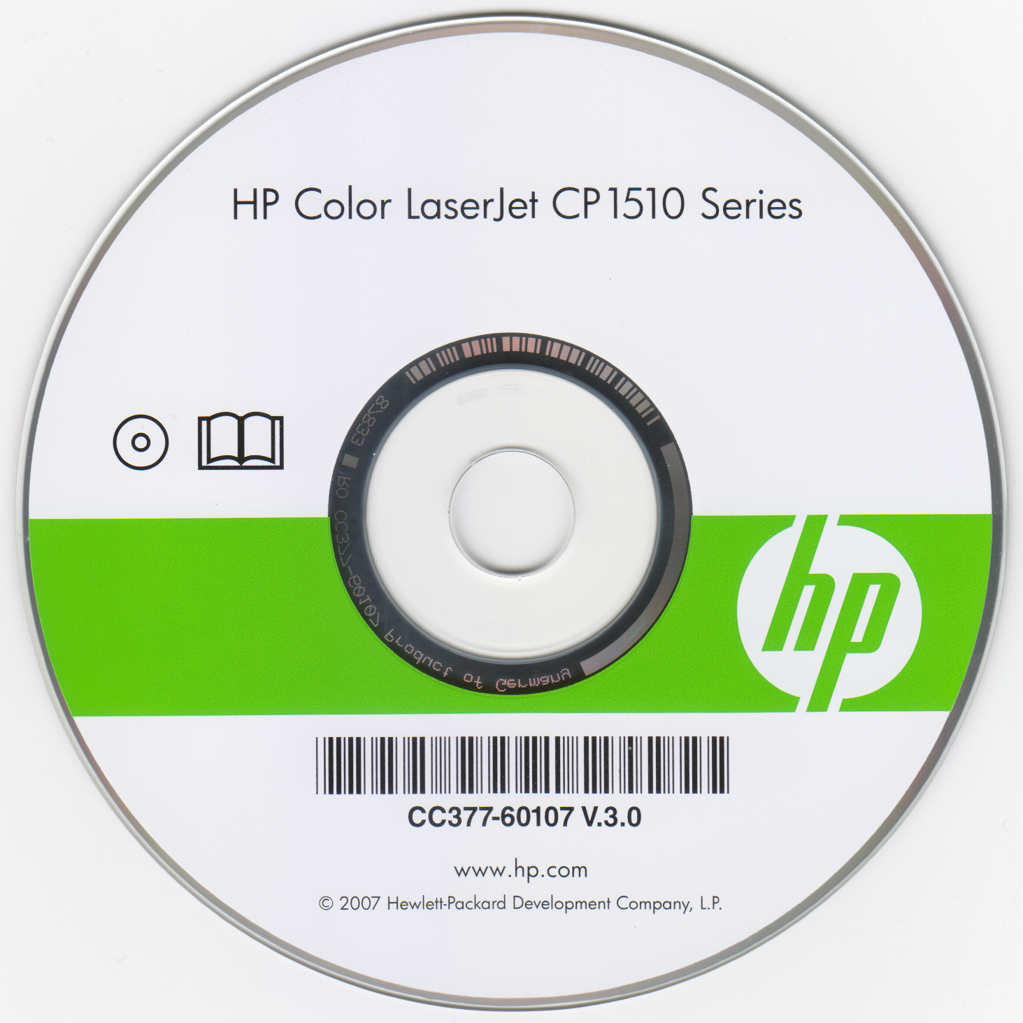 HP Color LaserJet CP1510 software installation disc